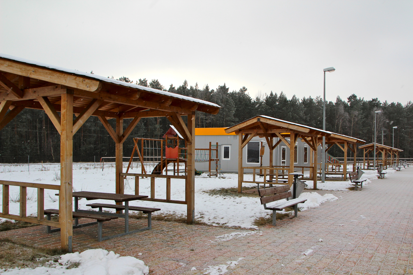 Miejsce Obsługi Podróżnych Czerna na Autostradzie A4 w Polsce.